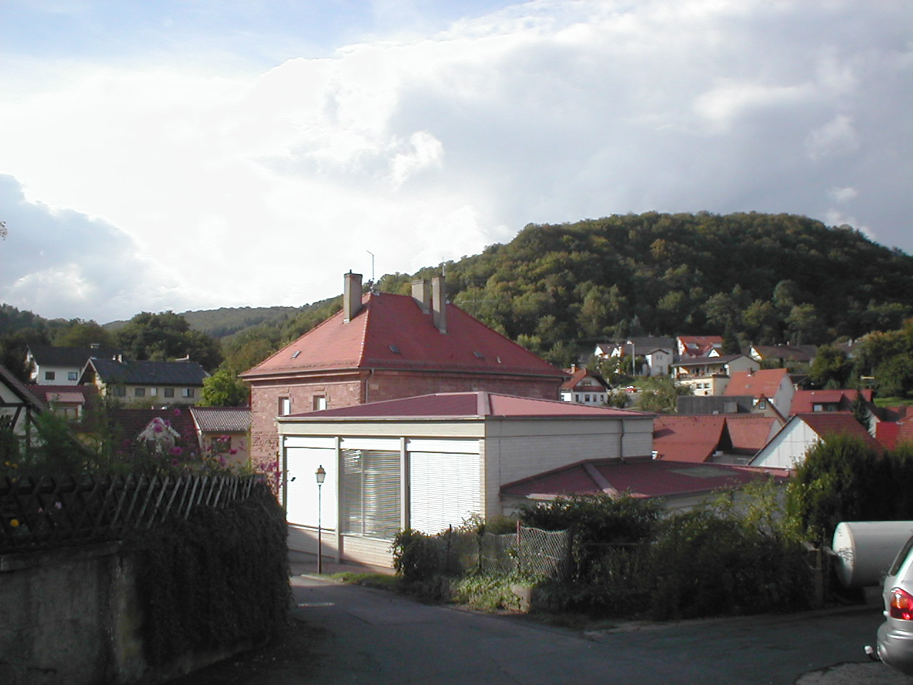 Blick über Hochhausen, im Vordergrund die 1909 erbaute Schule mit jüngerem Anbau.